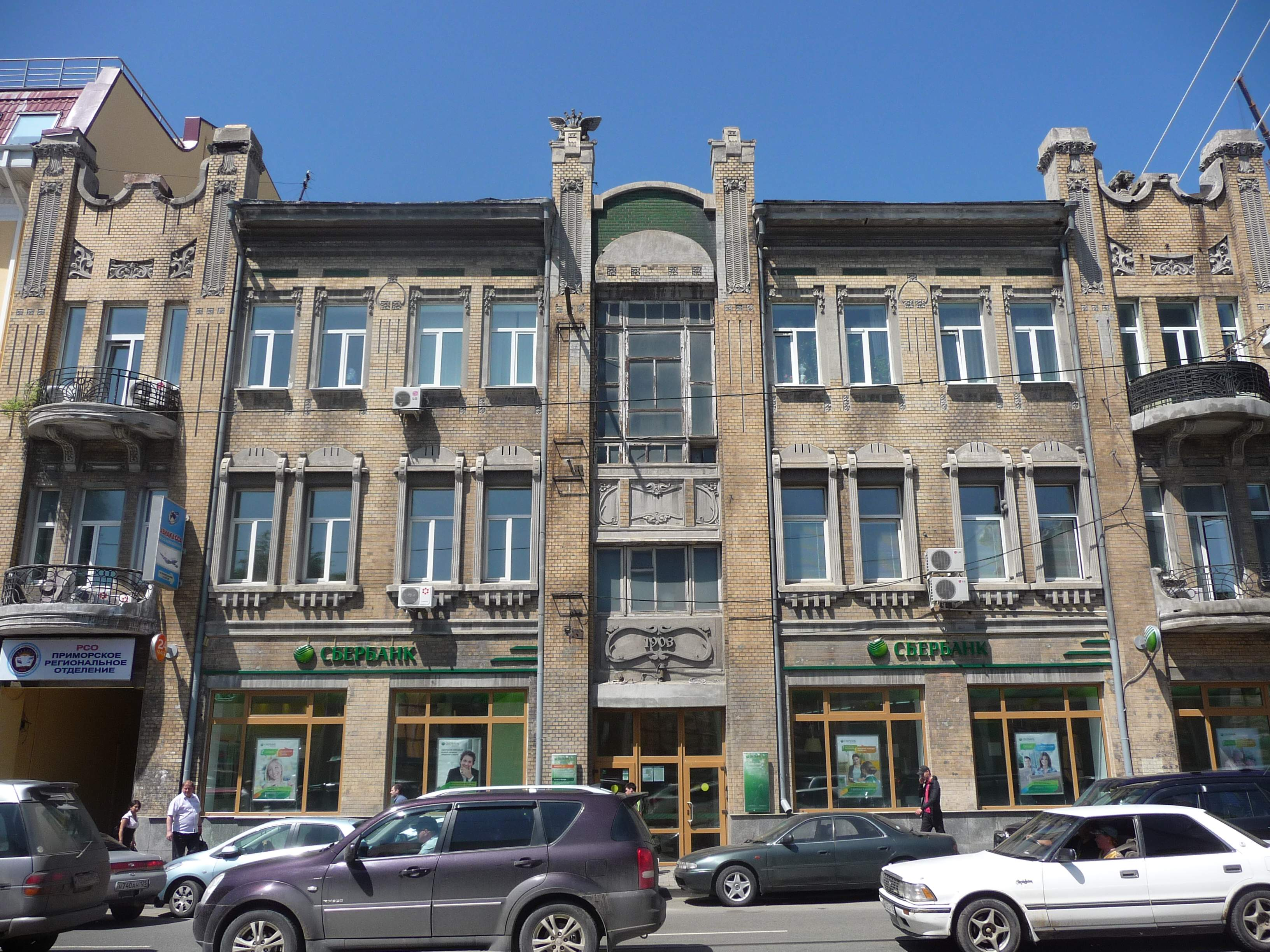 Владивосток, ул. Светланская, 59, 2012-07-05